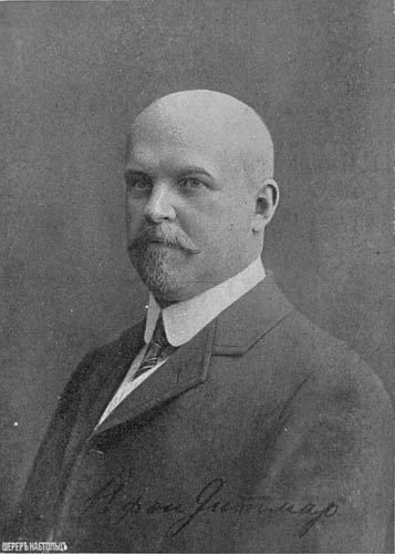 Н.Ф.фон-Дитмарпортрет Н.Ф.фон-Дитмара